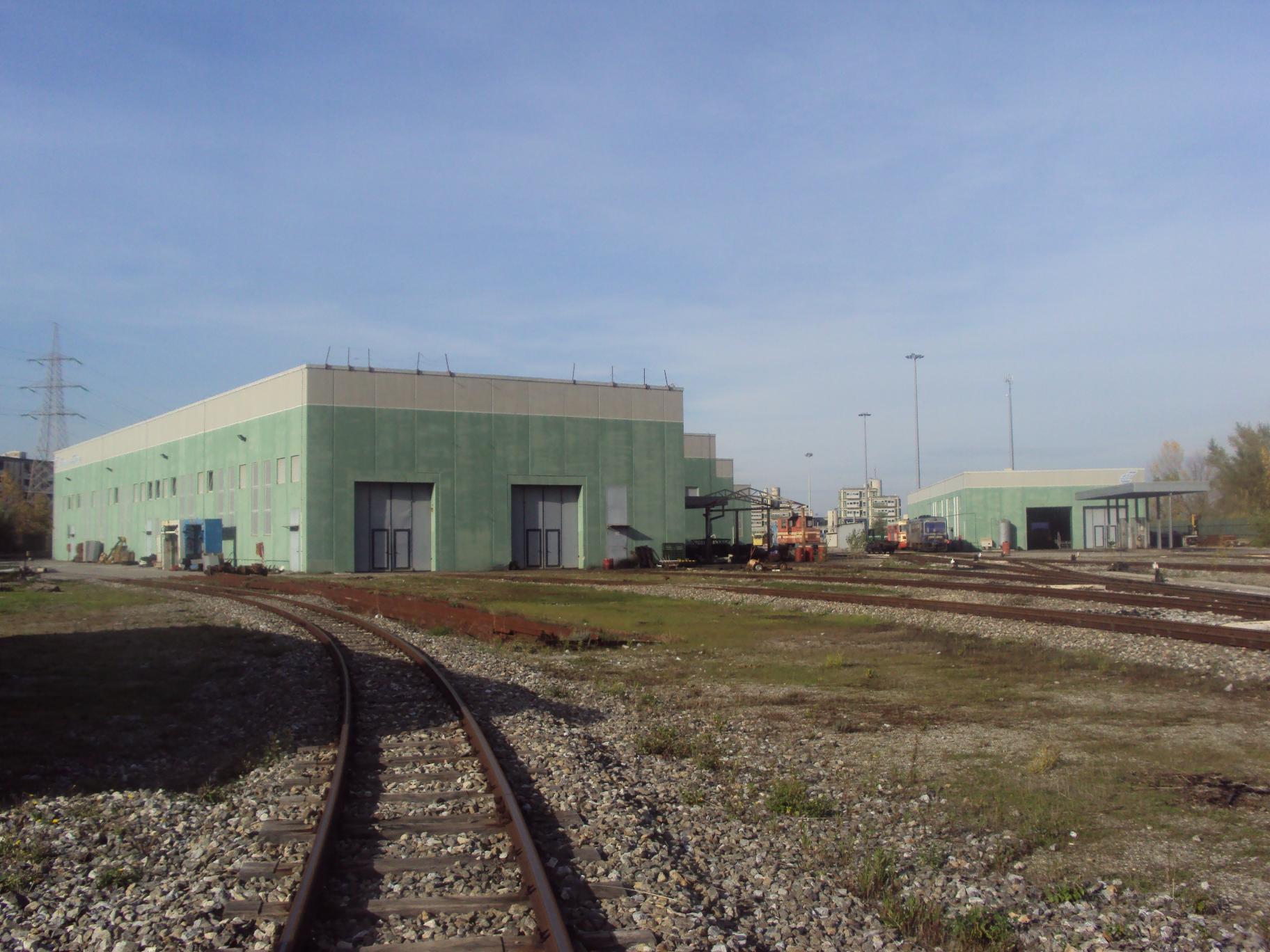 Officine ferroviarie di Cosenza Vaglio Lise